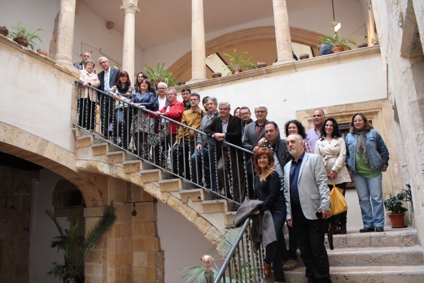 Equip Casa de les Lletres